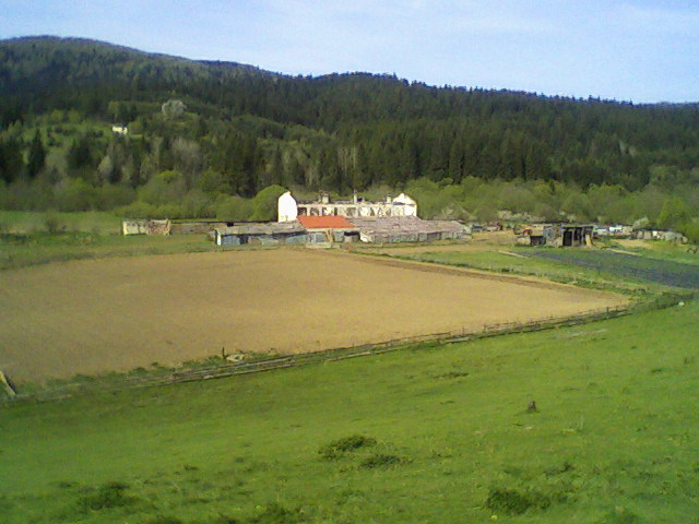 Школа у Округлици (Општина Вареш) након рата.